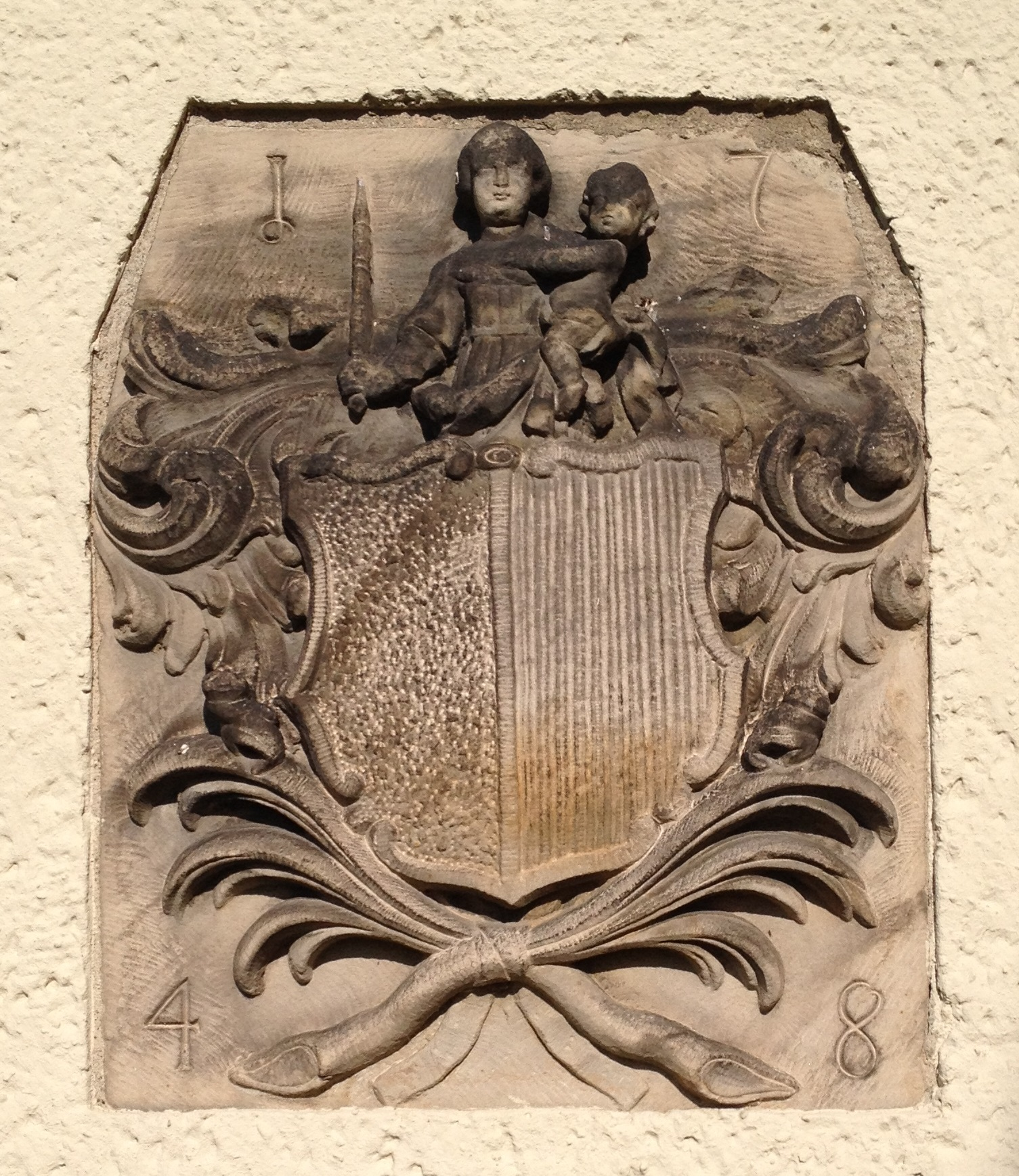 Wiedelah, St. Mariä Himmelfahrt, Wappen des Bistums Hildesheim am Querschiff, Jahreszahl 1748